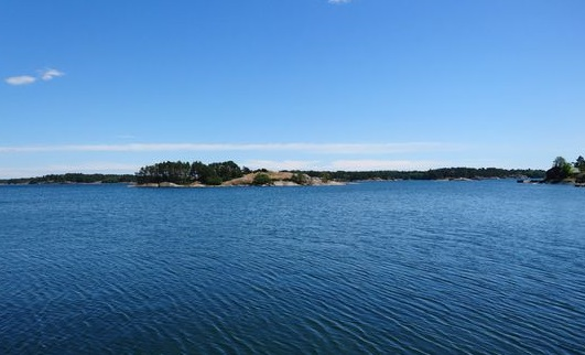 Högholmenin saaressa Hiittisten edustalla on sijainnut keskiajalla linnoitus ja siihen liittyvä satama.; Yleiskuva.